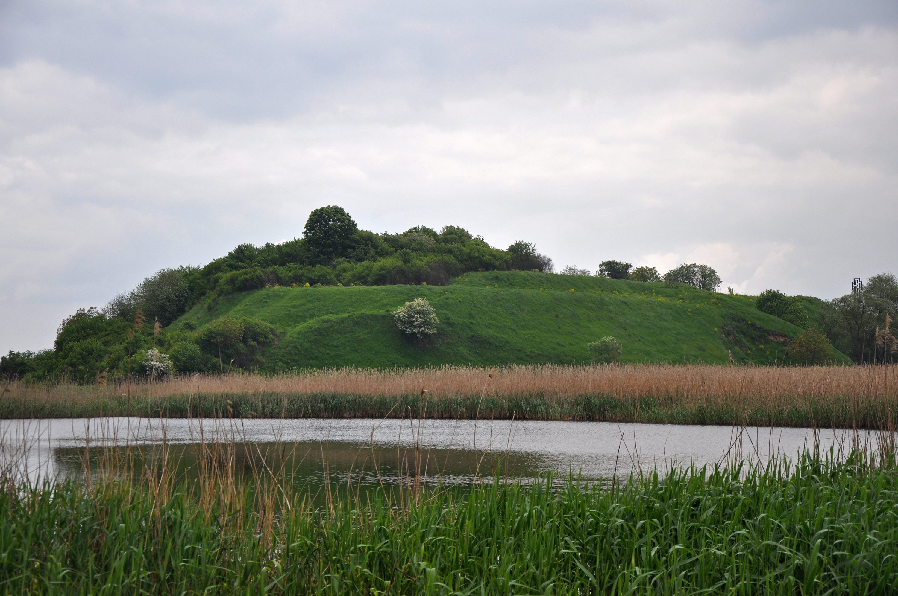 Городище давньоруське літописного міста Зудичева, Жидачів, ур.Замок, на східній околиці міста